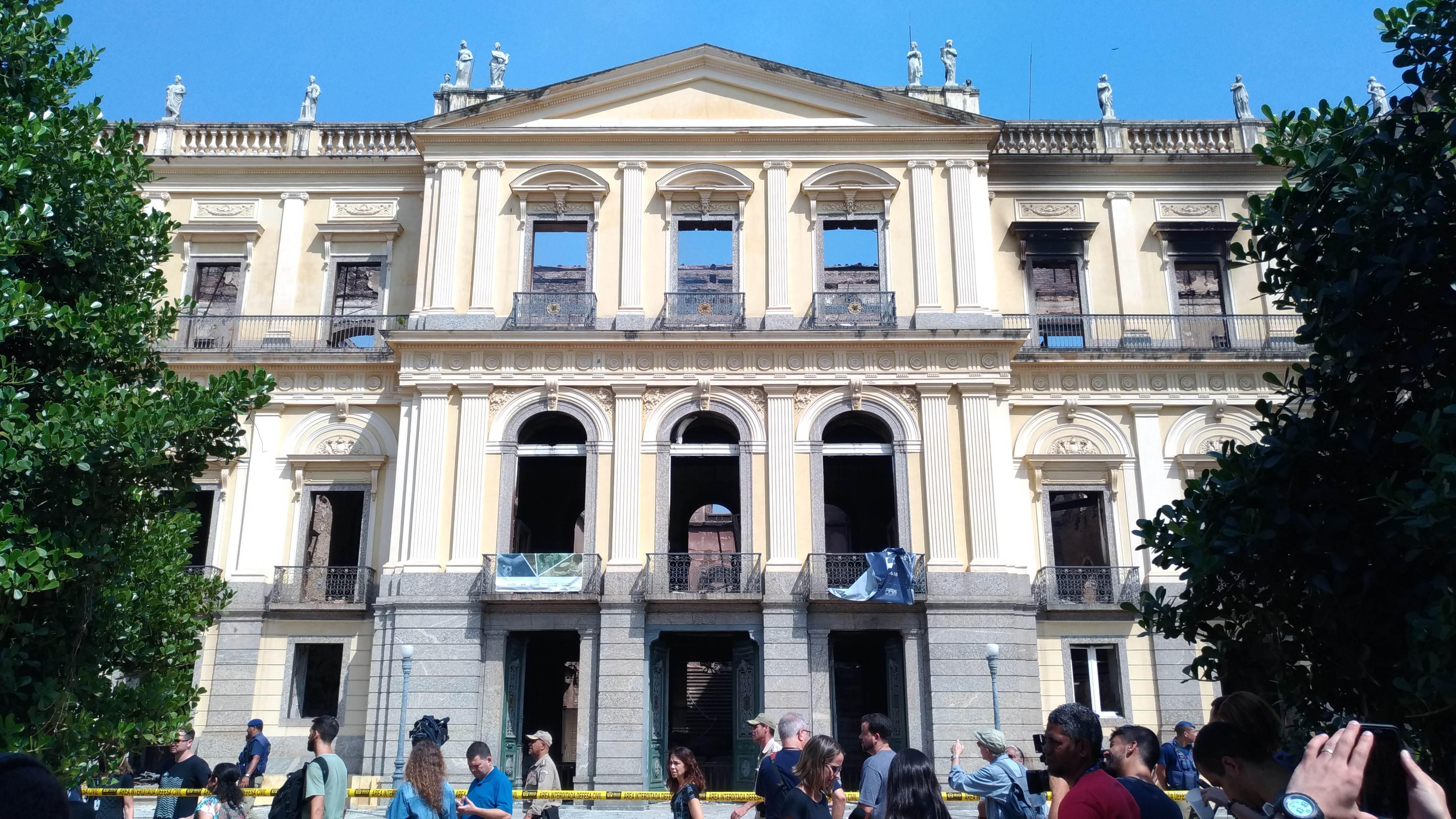 Fachada do museu